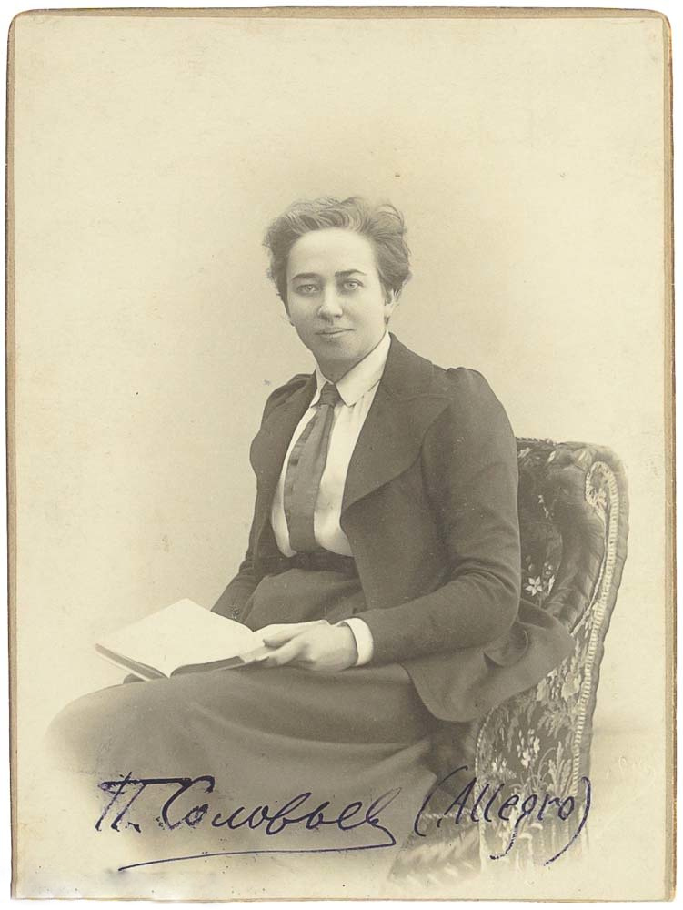 [Allegro, автограф]. Кабинетное фото Поликсены Соловьевой. Автограф в нижней части фото: «П. Соловьева (Allegro)». [1900-е гг.]. – 14,5х10,5 см. Фото наклеено на картон. Автограф слегка смазан. Поликсена Сергеевна Соловьева, писавшая под псевдонимом Allegro, (1867-1924), поэтесса, переводчица, издатель детского журнала «Тропинка».